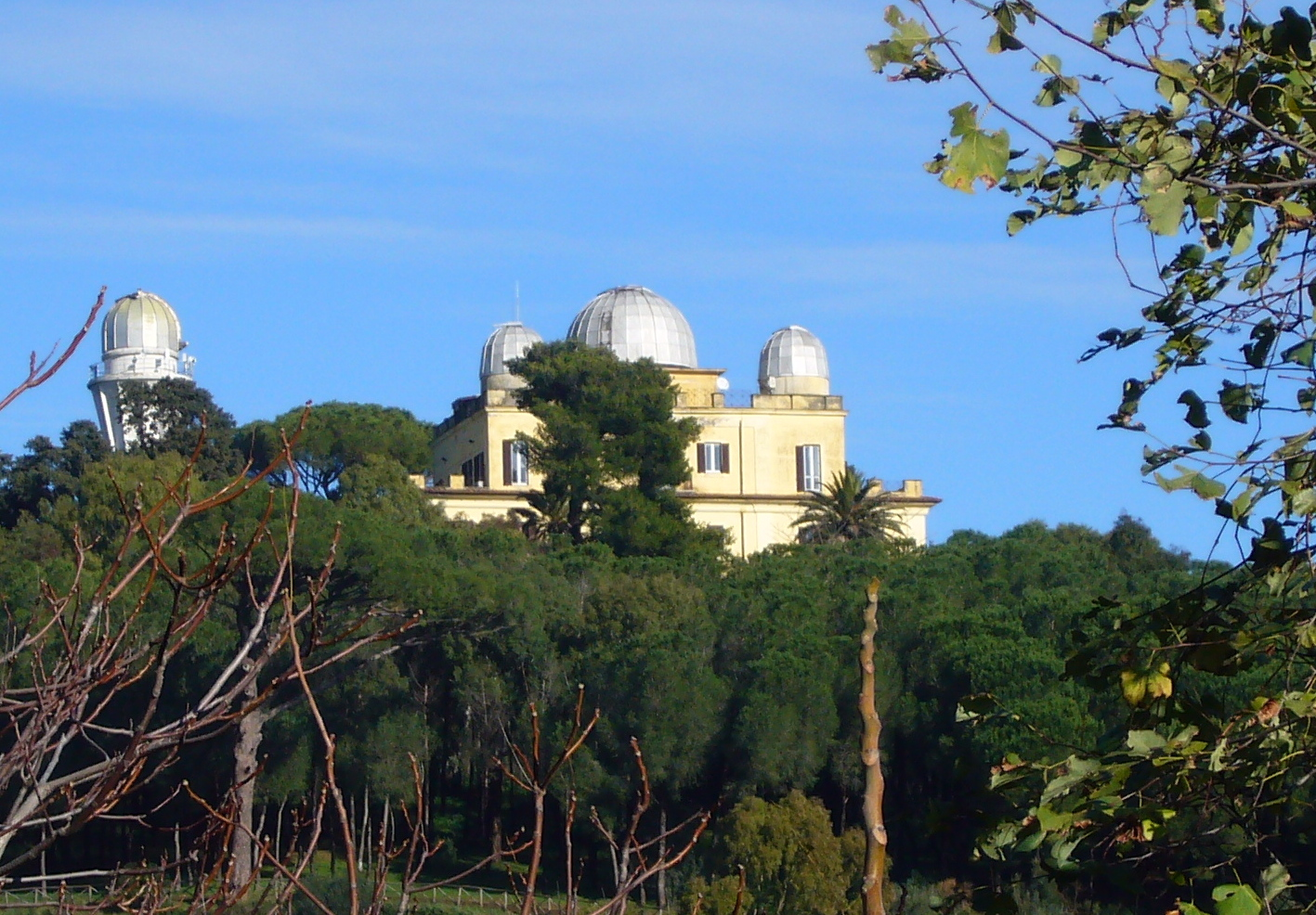 Nei miei 62 anni di vita, non ricordo che mai Roma sia stata colpita così duramente dalle intemperie. Colpa dei cambiamenti climatici causati dai gas ad effetto serra: Colpa anche della speculazione edilizia, che ha cementificato il territorio rendendolo impermeabile; l'acqua di pioggia non può più essere assorbita dal terreno, ma arriva tutta direttamente al Tevere, facendolo esondare. (Questo è l'osservatorio astronomico, a Monte Mario).